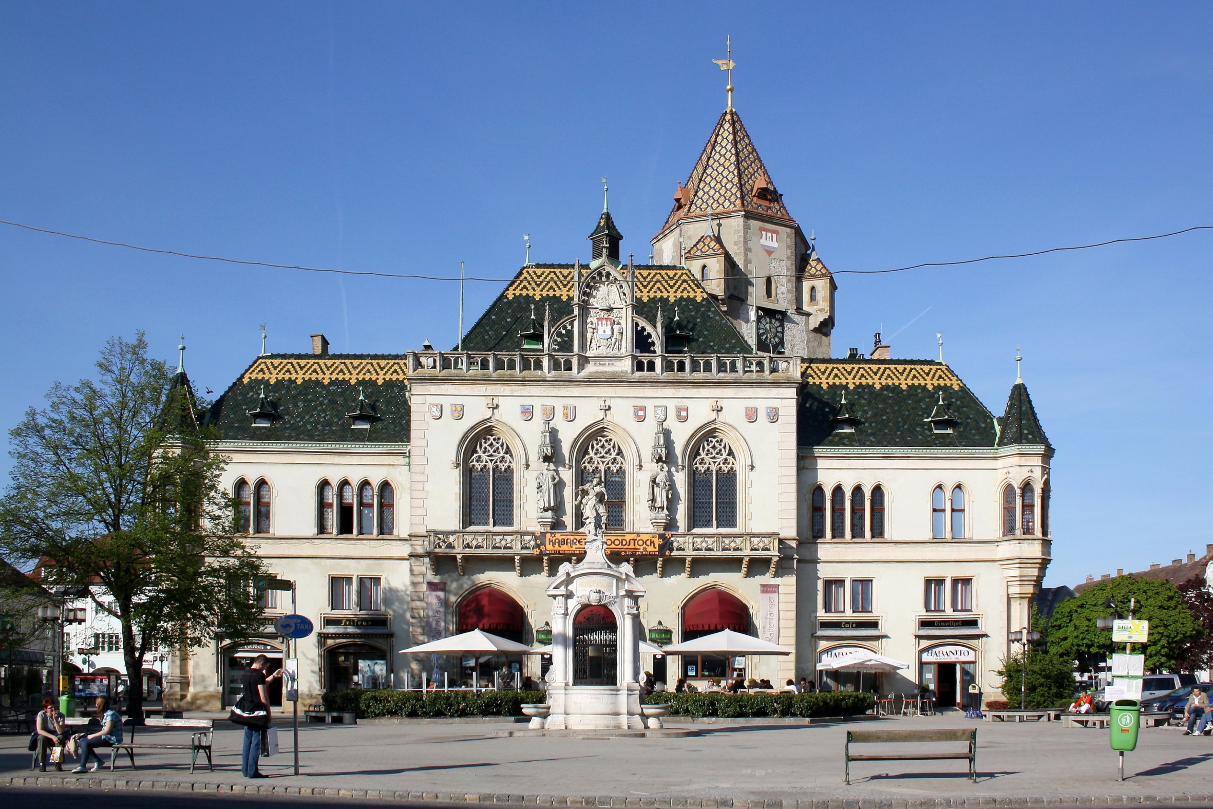 Das neogotische Rathaus in der niederösterreichischen Stadt Korneuburg. Davor der "Rattenfängerbrunnen" und dahinter der spätgotische Stadtturm aus der Mitte des 15. Jahrhunderts.